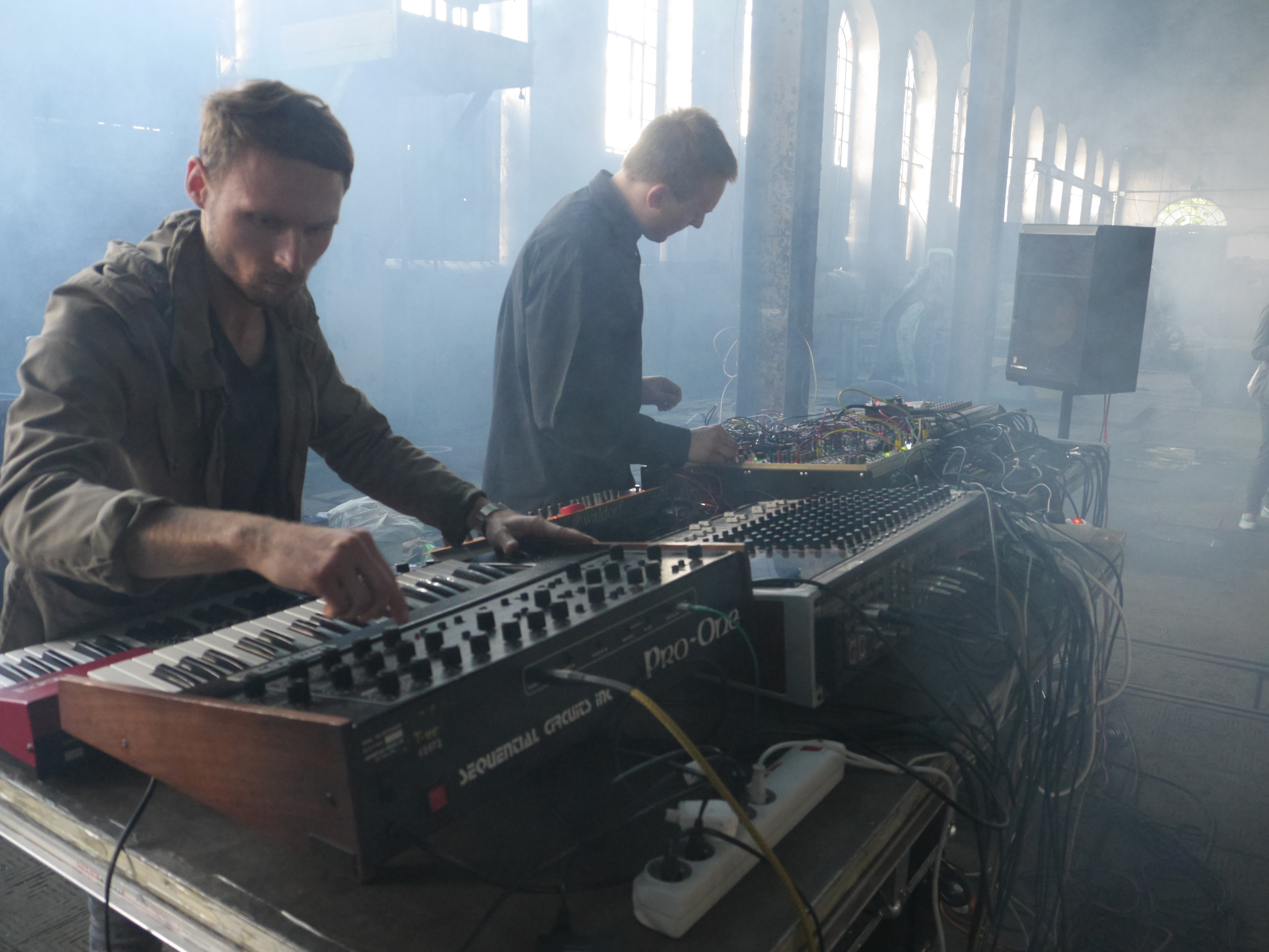 Walcownia cynku w Szopienicach This image was taken during project Industriada 2014 organized and supported by Wikimedia Polska. English | Esperanto |+/− This photo was taken with Panasonic Lumix DMC-GH3 camera, thanks to Panasonic. You can see all photographs in category: Taken with Panasonic Lumix DMC-GH3.